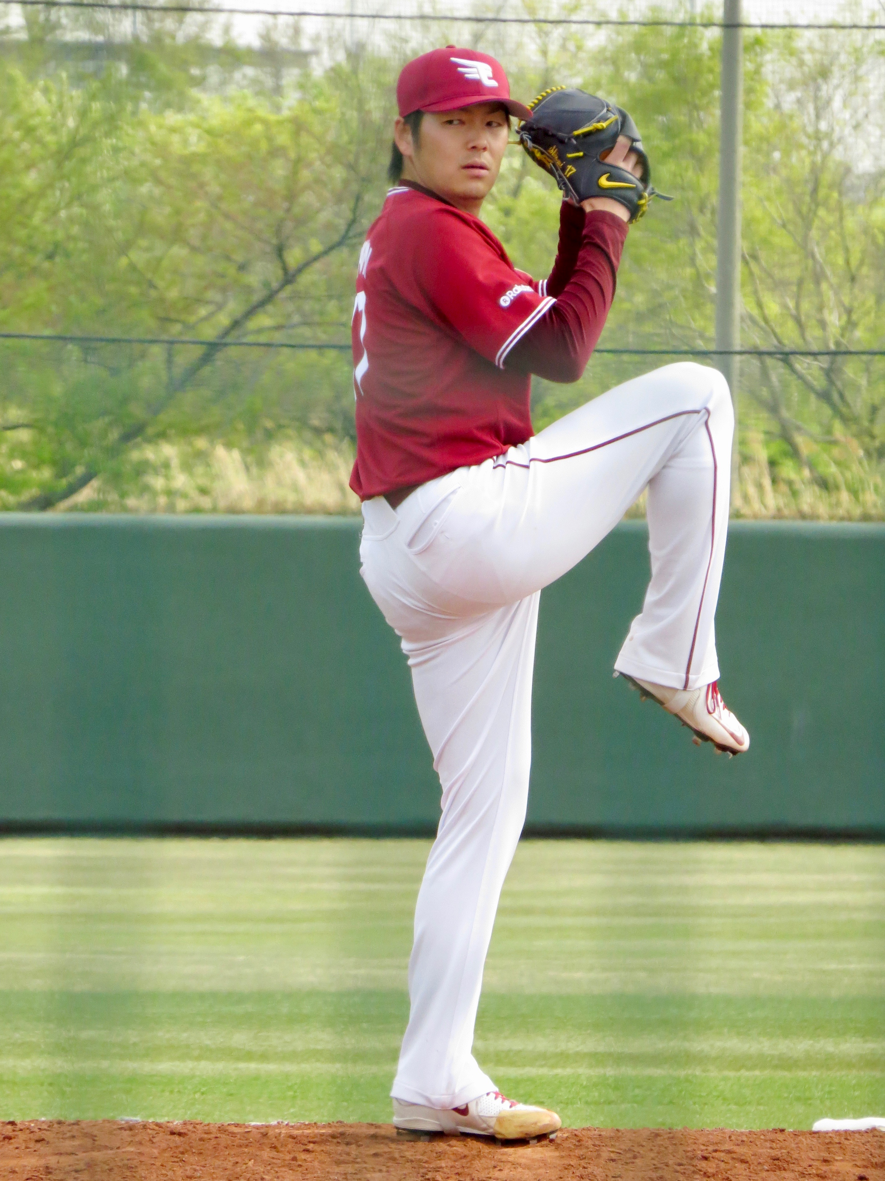 東北楽天ゴールデンイーグルスの選手「塩見貴洋」、ヤクルト戸田球場にて。